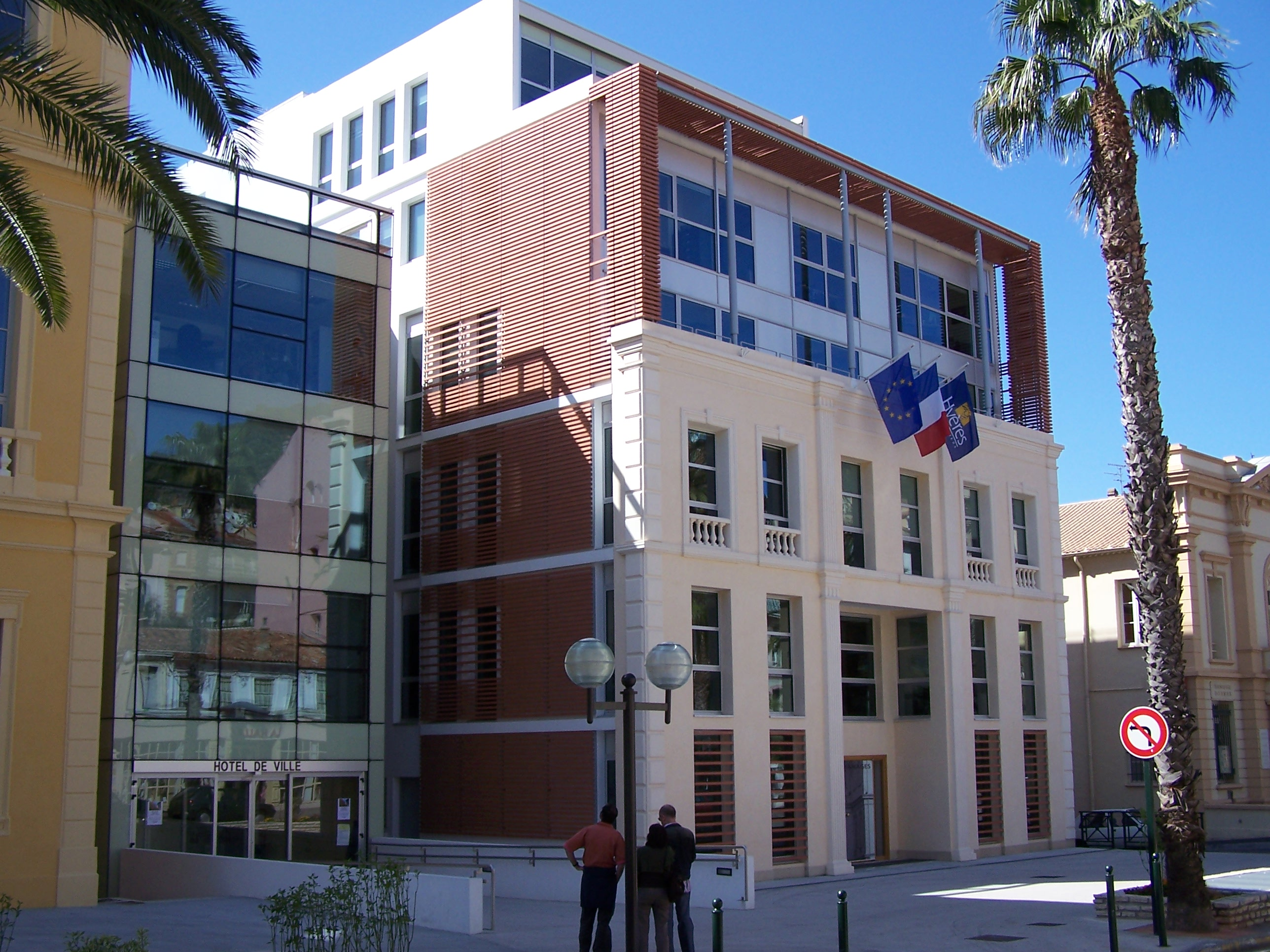 Vue de l'Hotel de Ville de Hyères